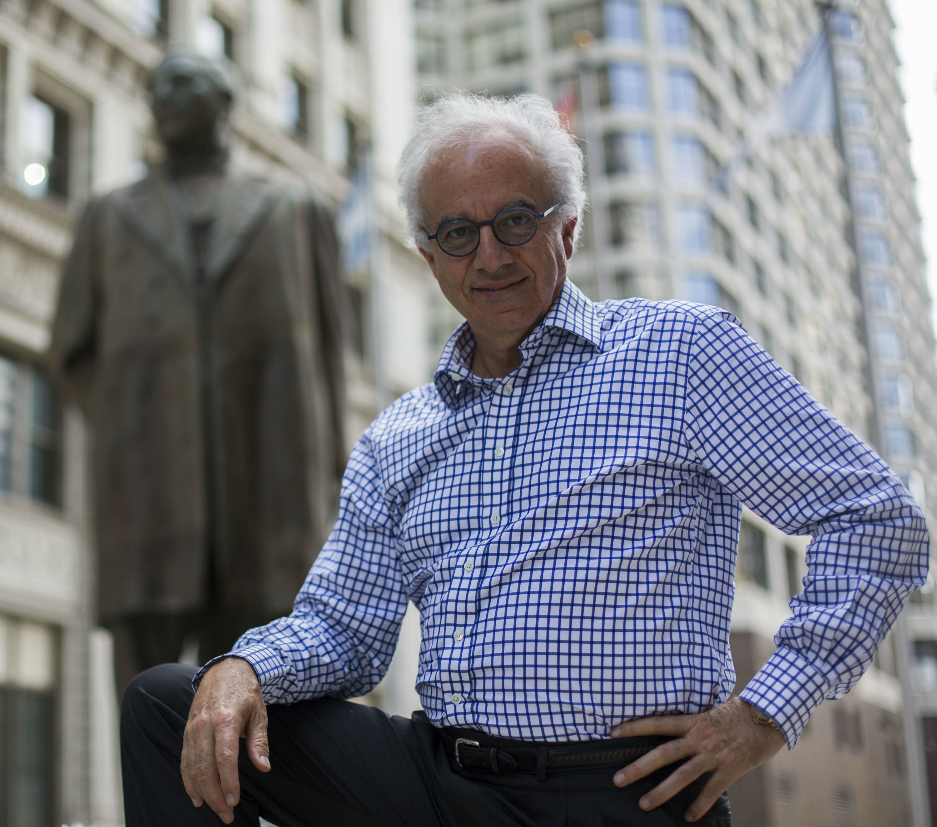 Francisco Martín Moreno